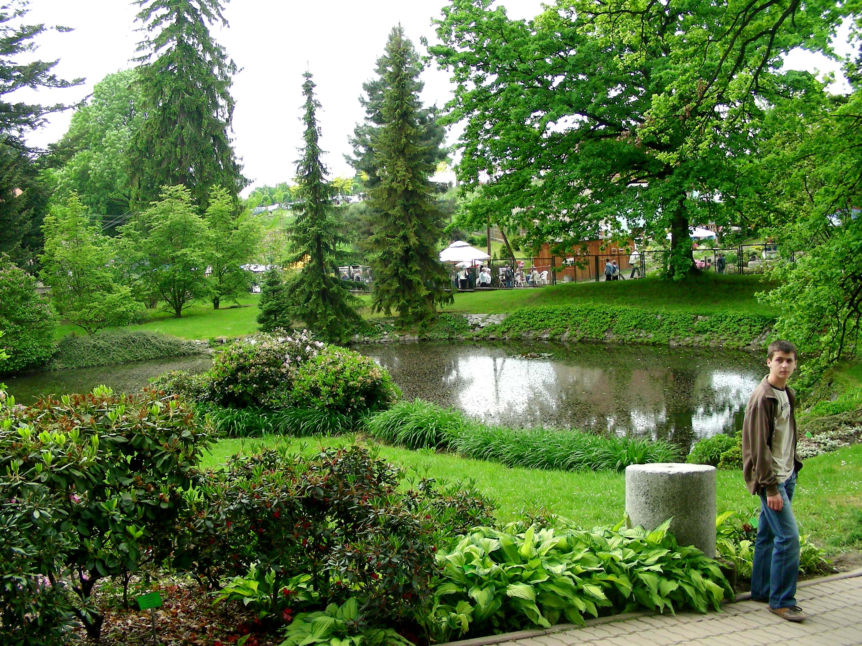 Arboretum w Wojsławicach, gmina Niemcza, województwo Dolnośląskie, Polska